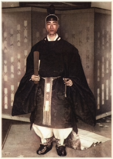 葛城茂麿。もと(山階宮)茂麿王